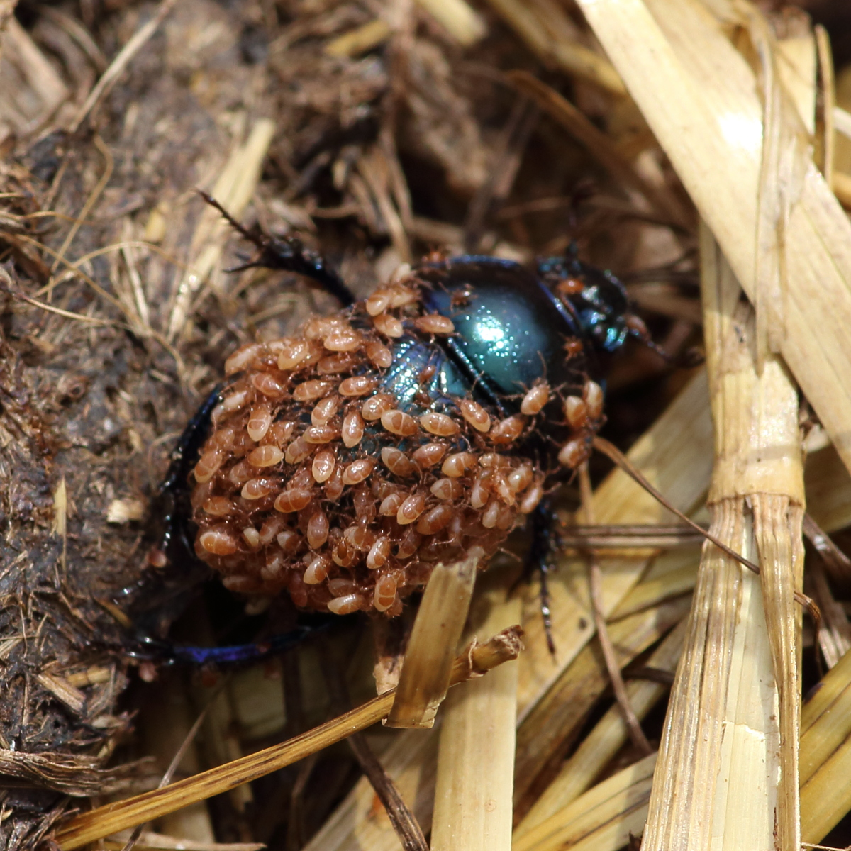 Milben, welche einen Mistkäfer als Taxi nutzen